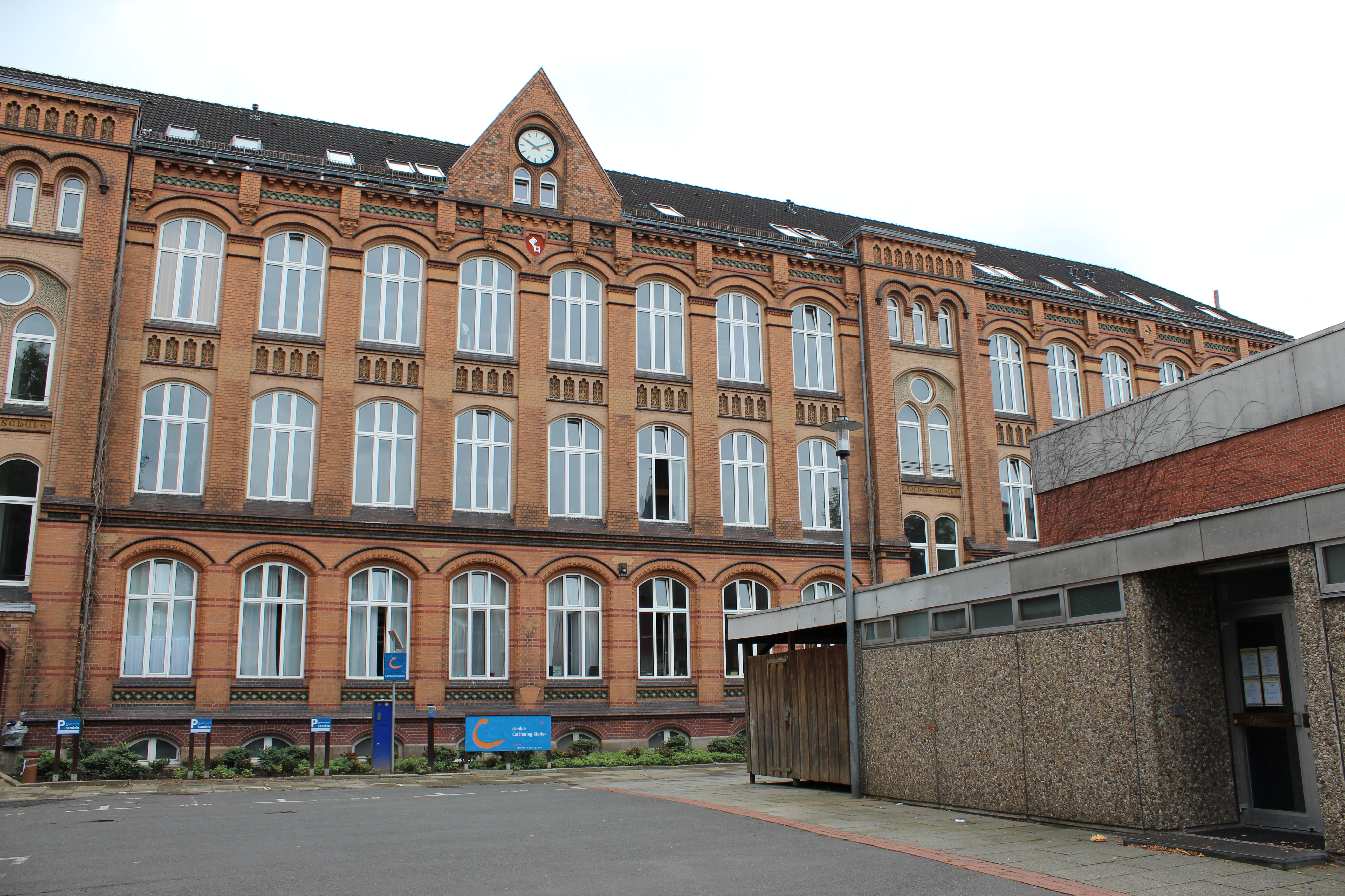 Elisabethschule in Bremen, Elisabethstraße 135 / Hoffnungstraße - Mädchenschule.Das abgebildete Objekt ist ein geschütztes Kulturdenkmal in der Freien Hansestadt Bremen, mit der Nr. 0325 beim Landesamt für Denkmalpflege registriert.